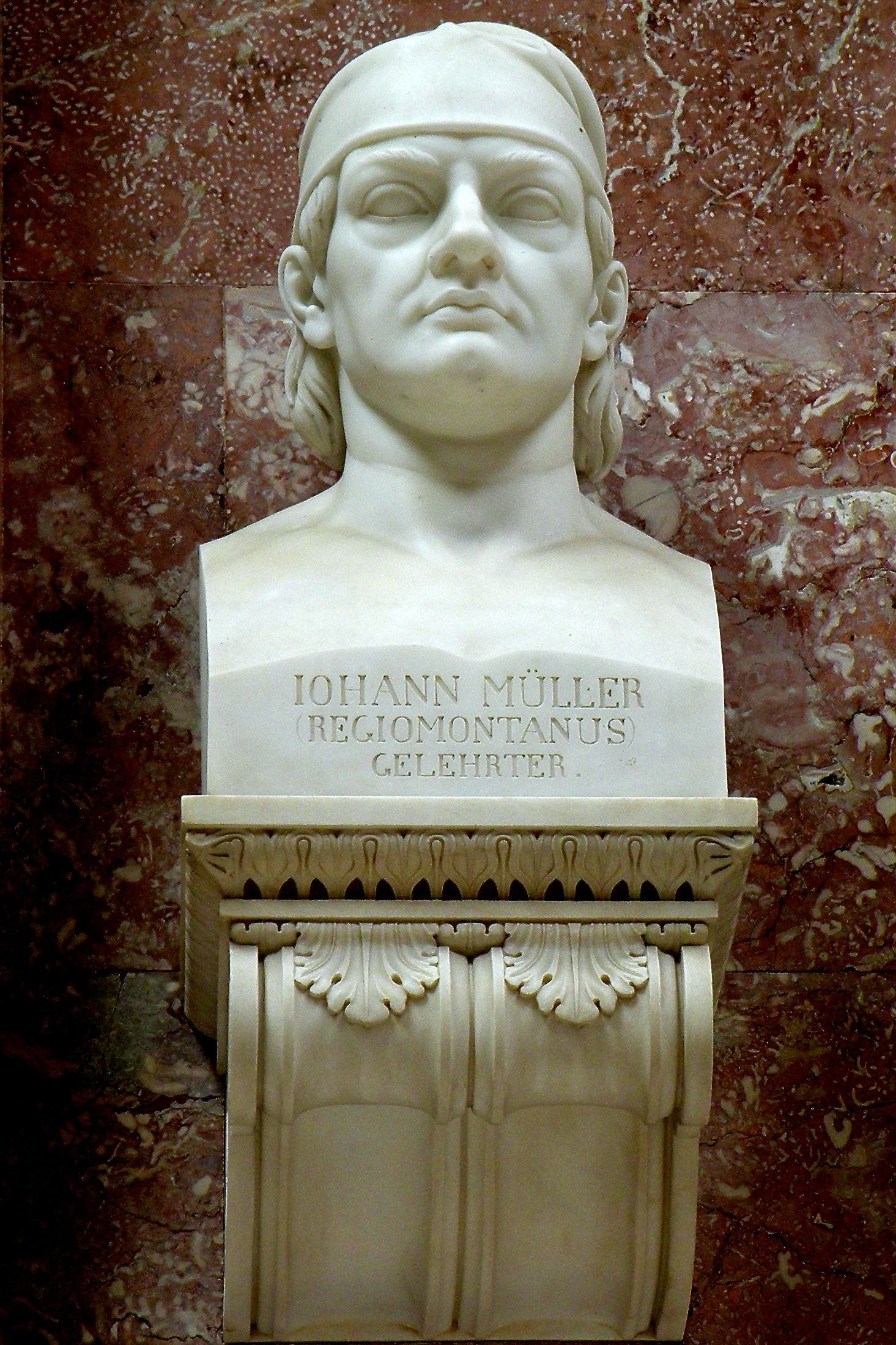 Büste des Gelehrten Johann Müller, RegiomontanusThis is a photograph of an architectural monument.